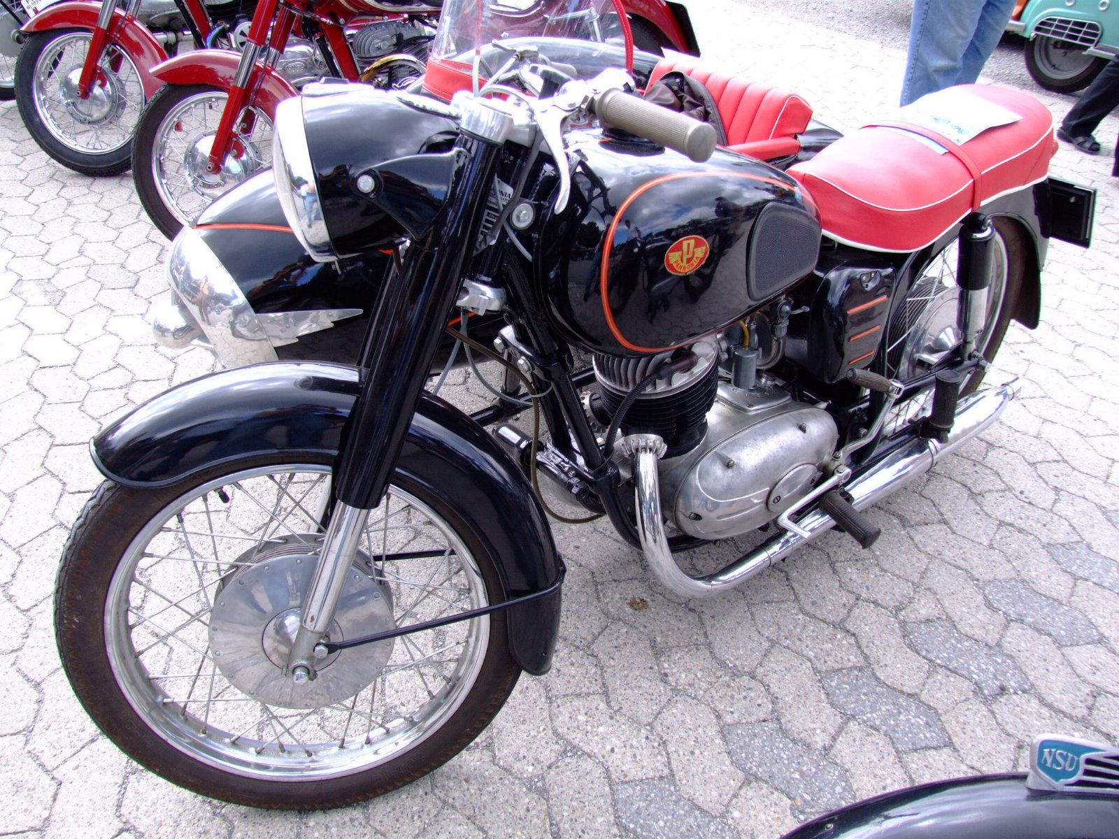 Pannonia_Csepel_250_T1_Side_del 1959 - Ungheria